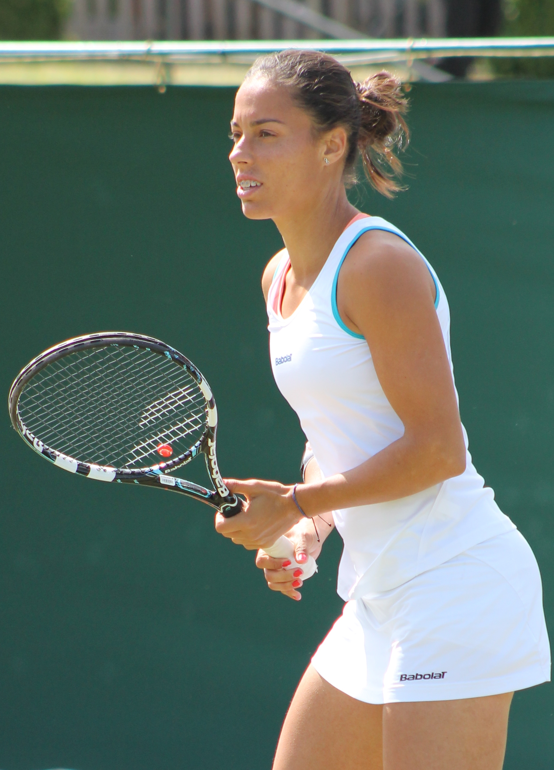 Cabeza Candela WMQ14 (5)